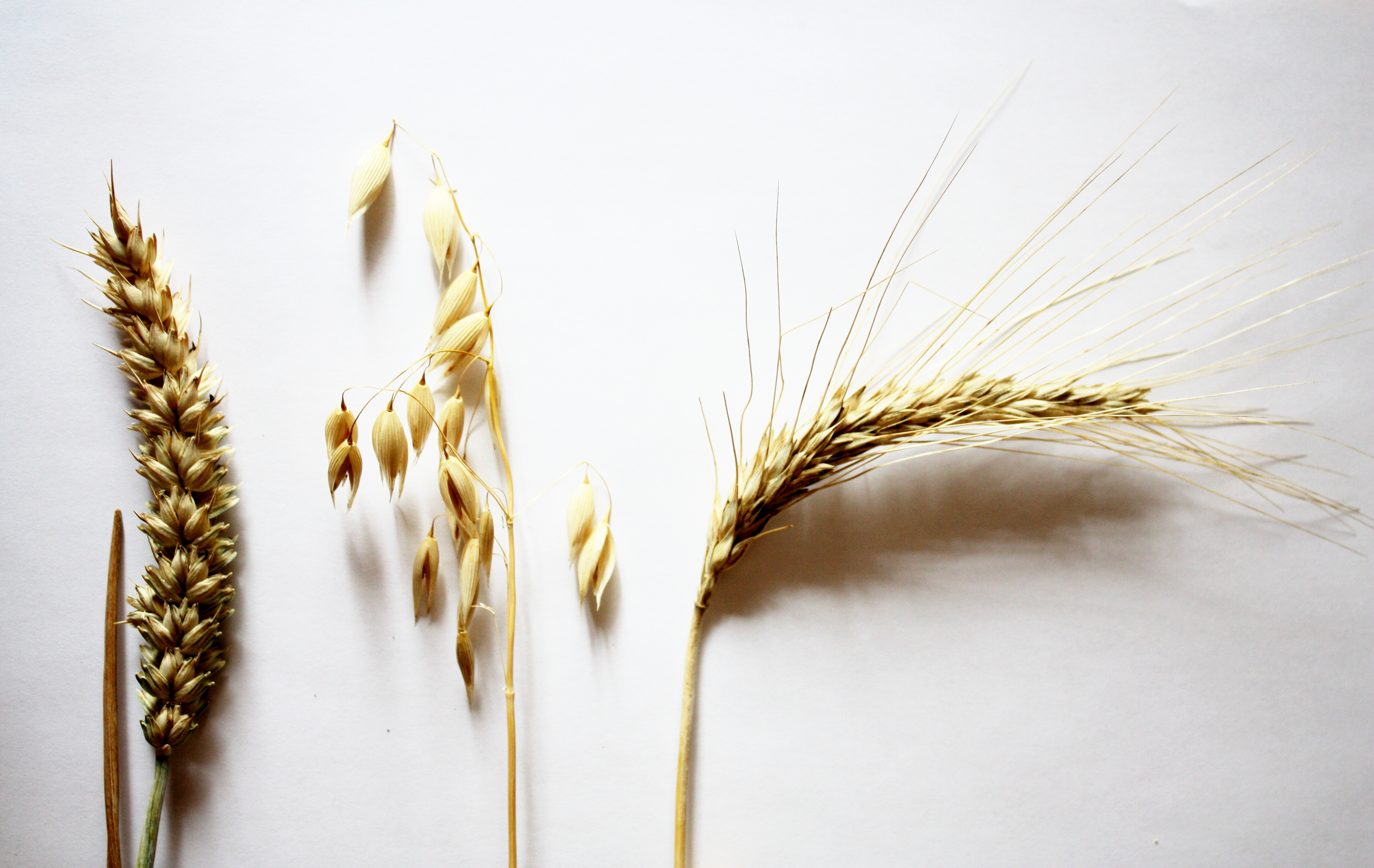 Getreidesorten